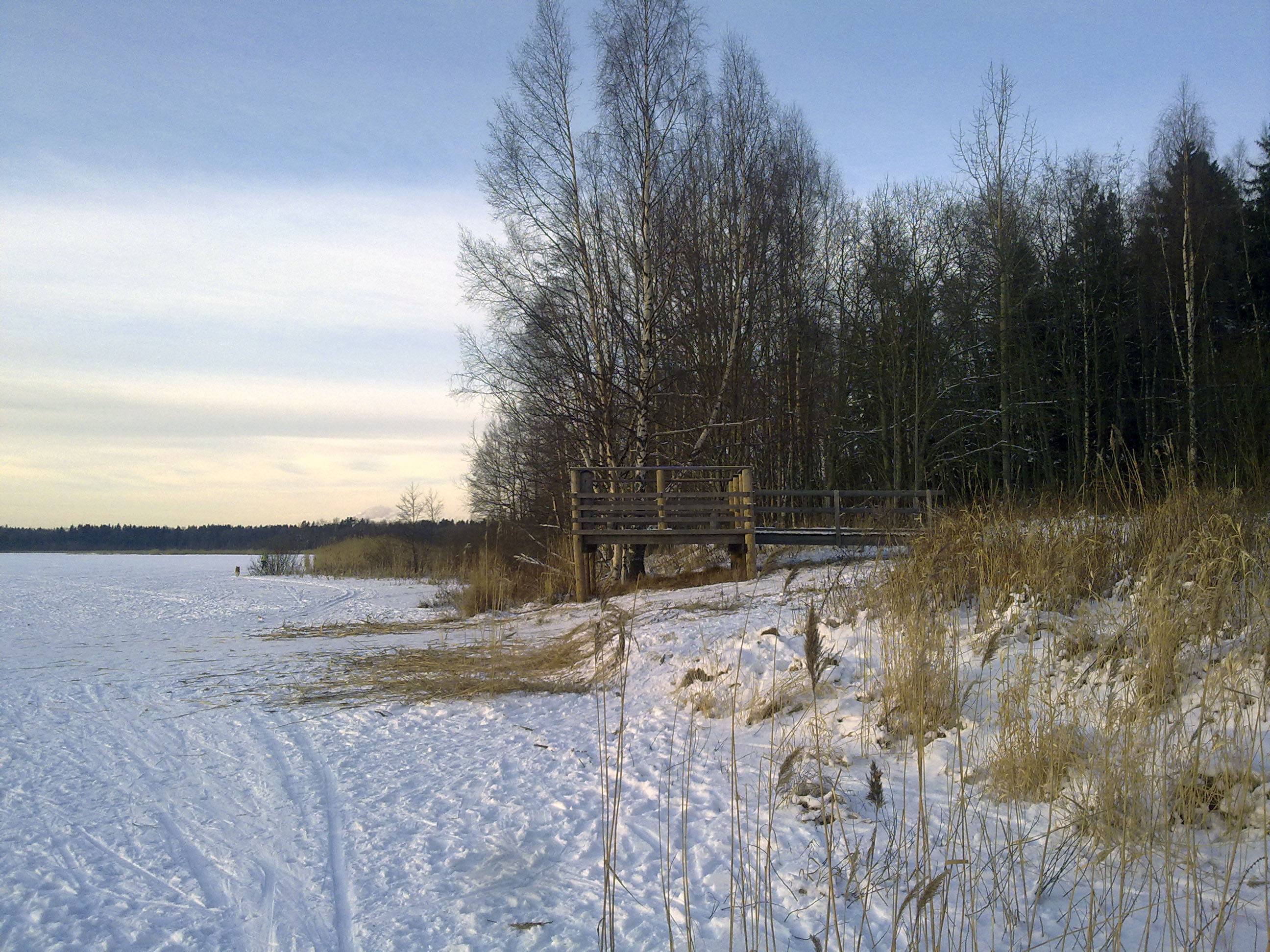 Enäjärven koillispuolen uudempi havaintolava.